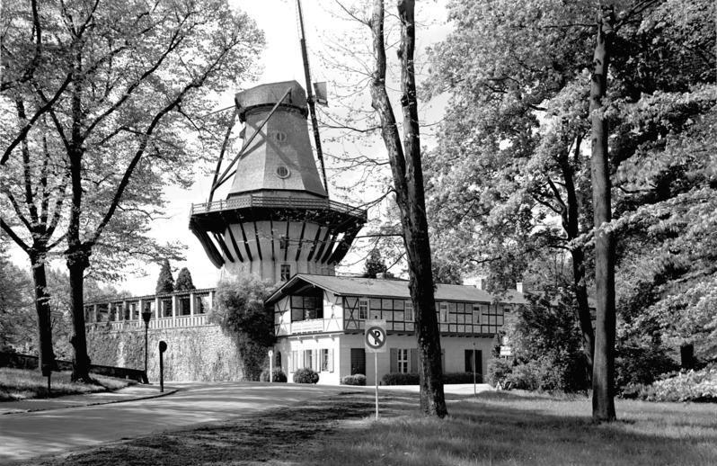 Potsdam.- Sanssouci, Historische Mühle